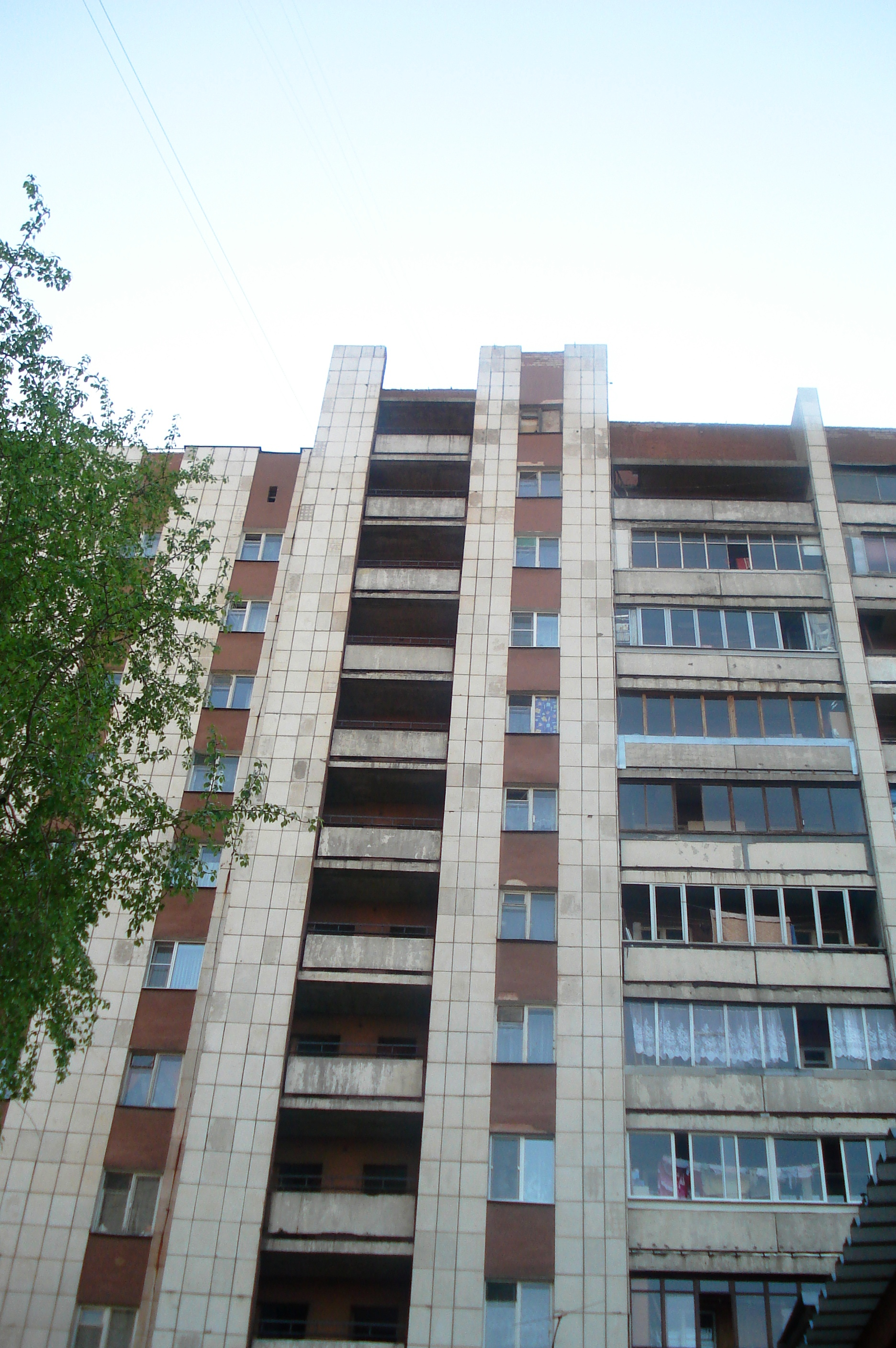 Дом №70 по улице Димитрова